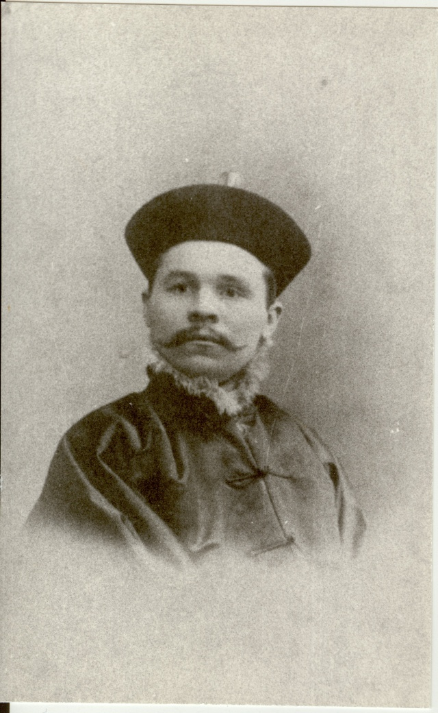 Fotograafi Aadu Treufeldti portree. Teine nimekuju Ado Treufeld